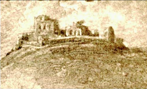 E. Danti 1580-81 nucleo medievale della Provvidenza o Castelo di Pietrarossa a Caltanissetta